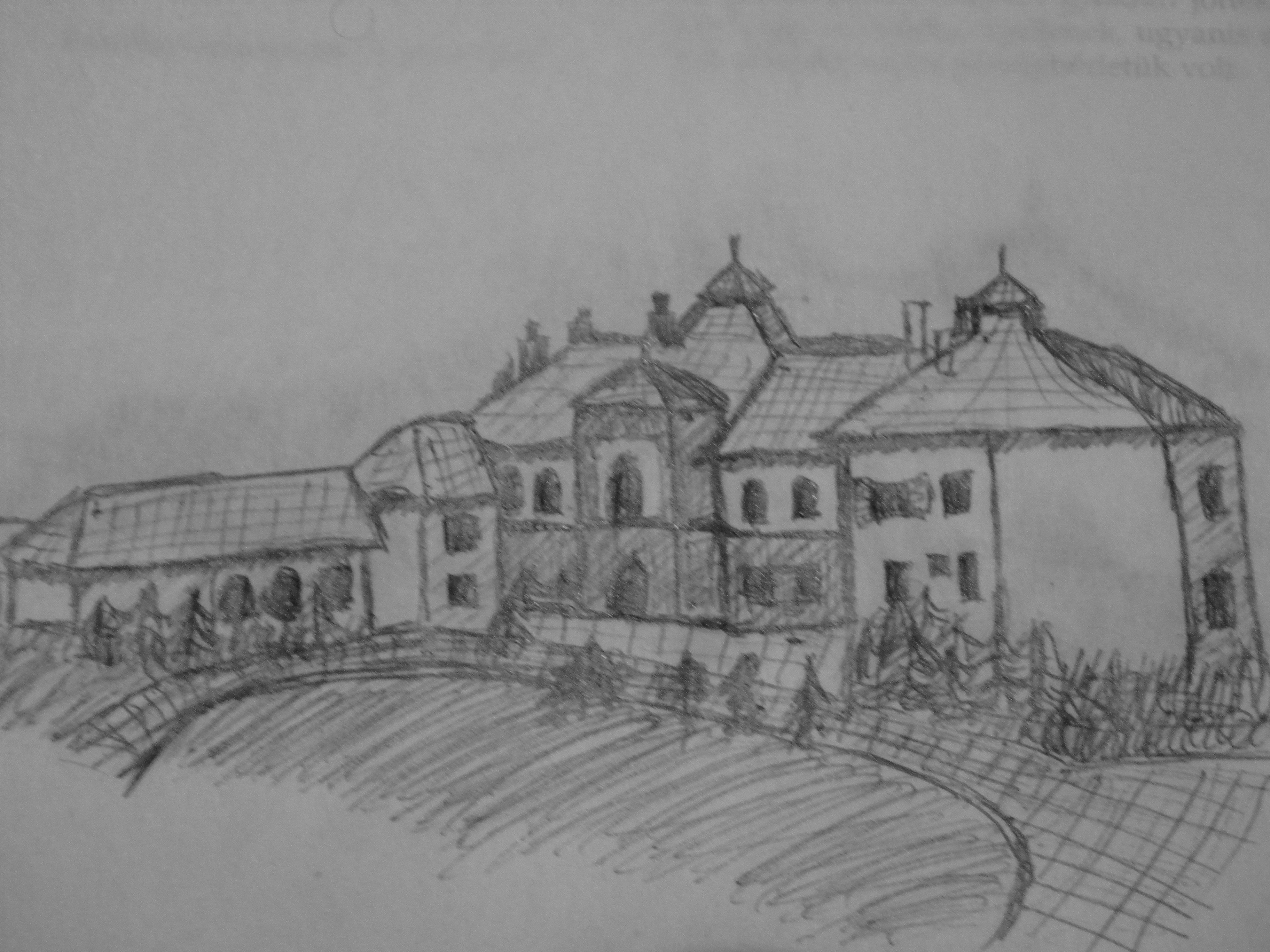 Castelul lui Bornemisza Elemer din Asuaju de Sus